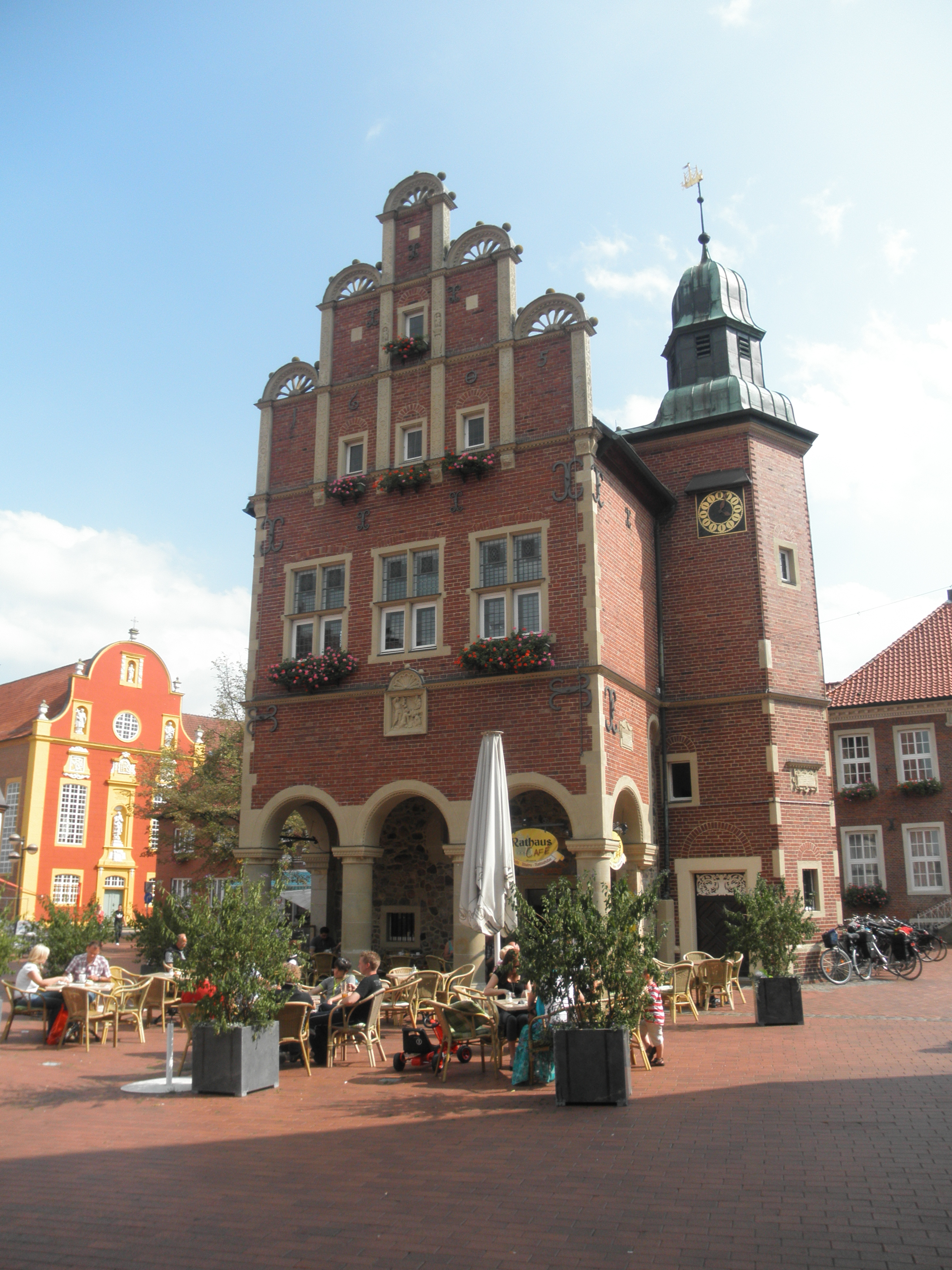 Historia urbodomo Meppen